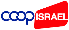 סמליל הקואופ - אנגלית